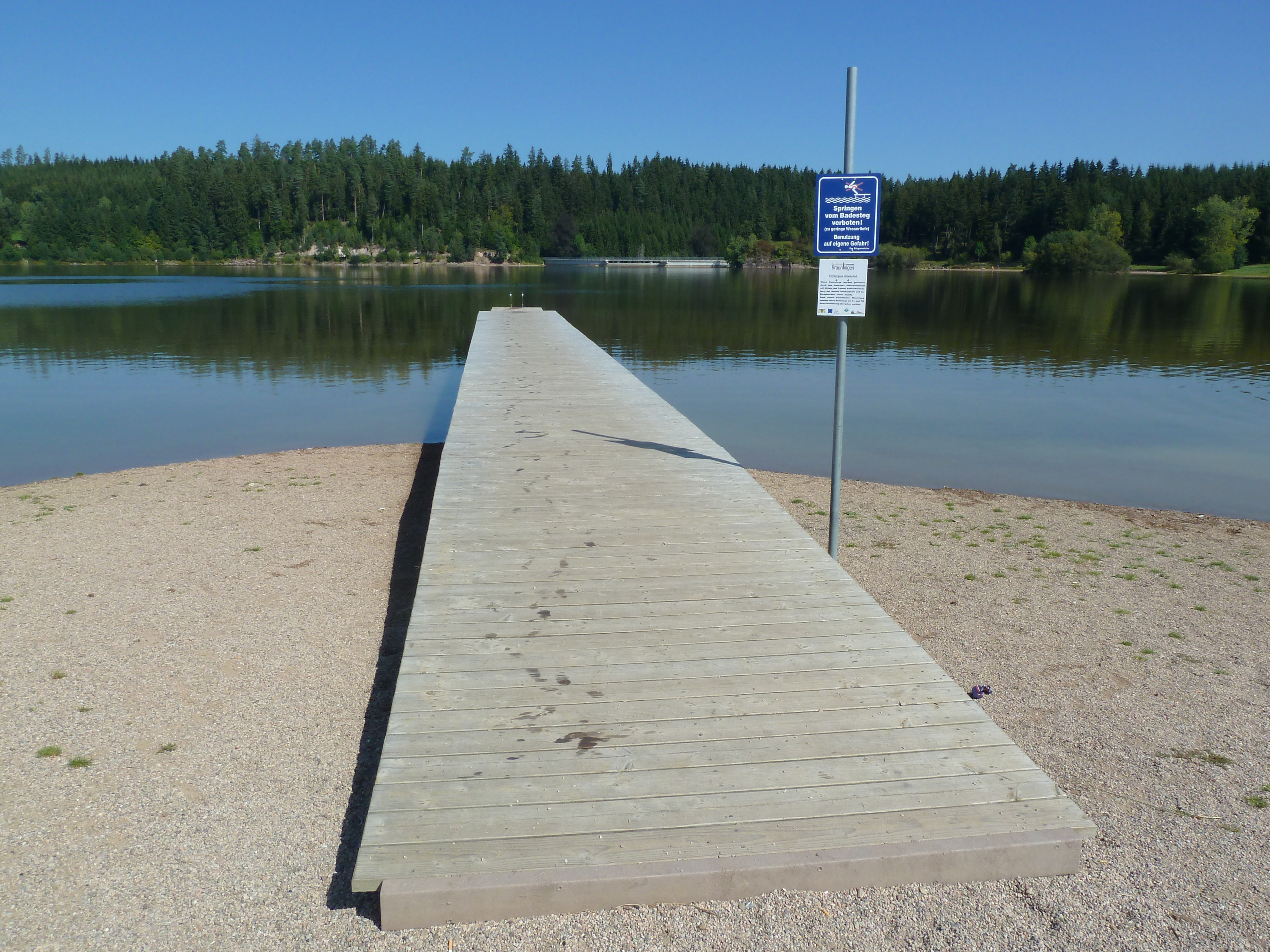 Badesteg und Warnschild am Kirnbergsee